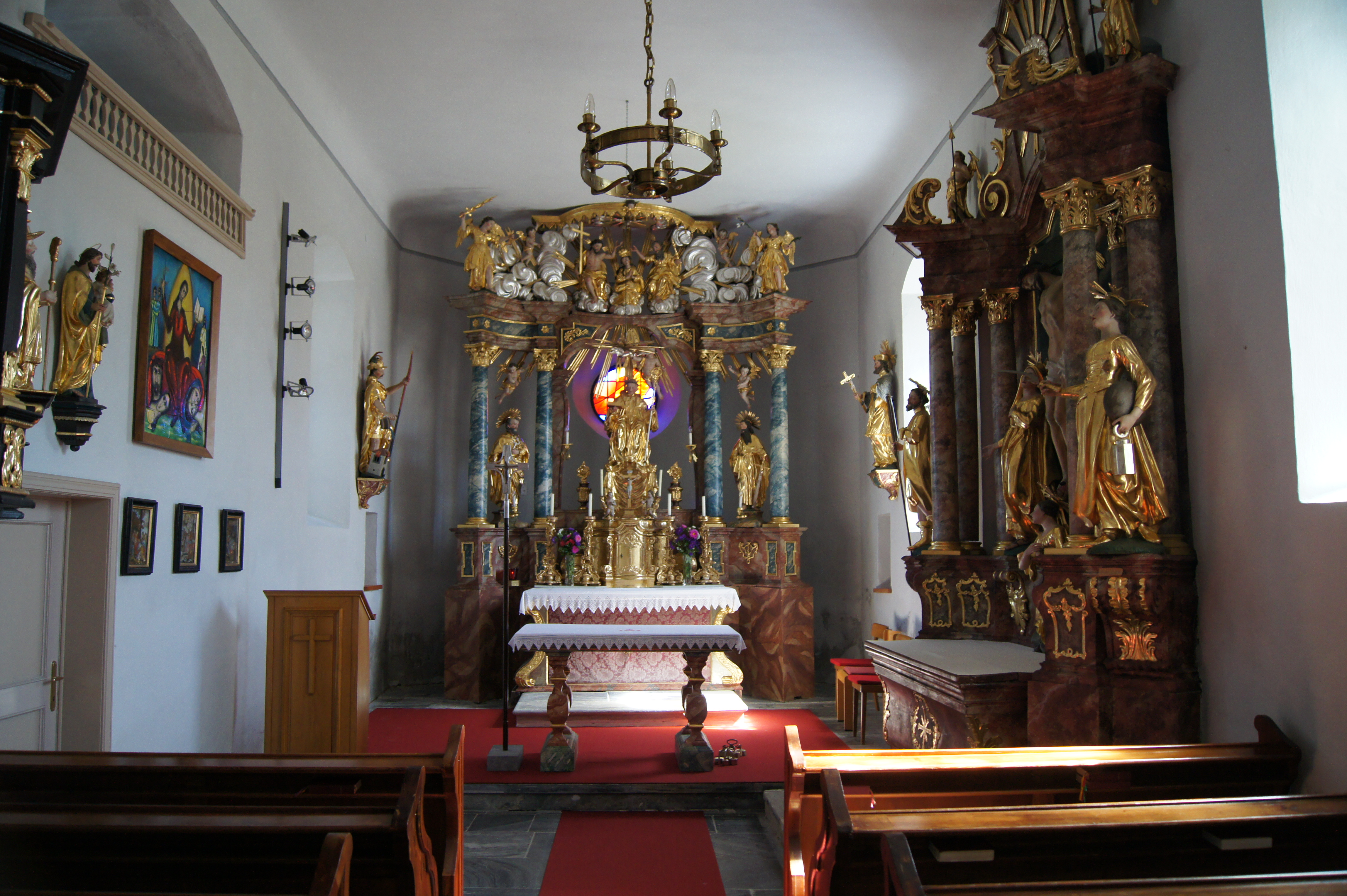 Kath. Pfarrkirche hl. Ägidius mit ummauertem Friedhof, Innenraum